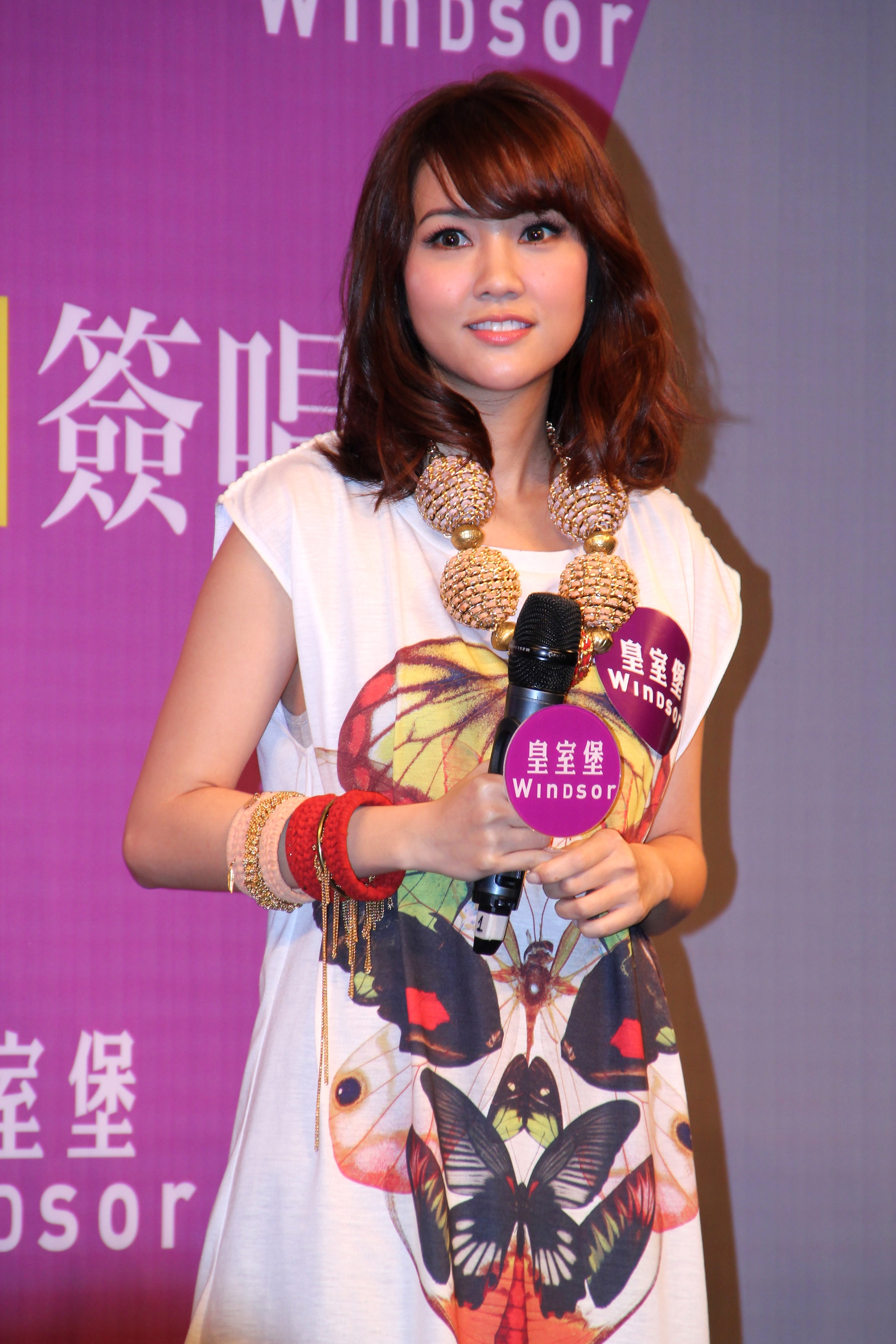 粵語: 謝安琪相片